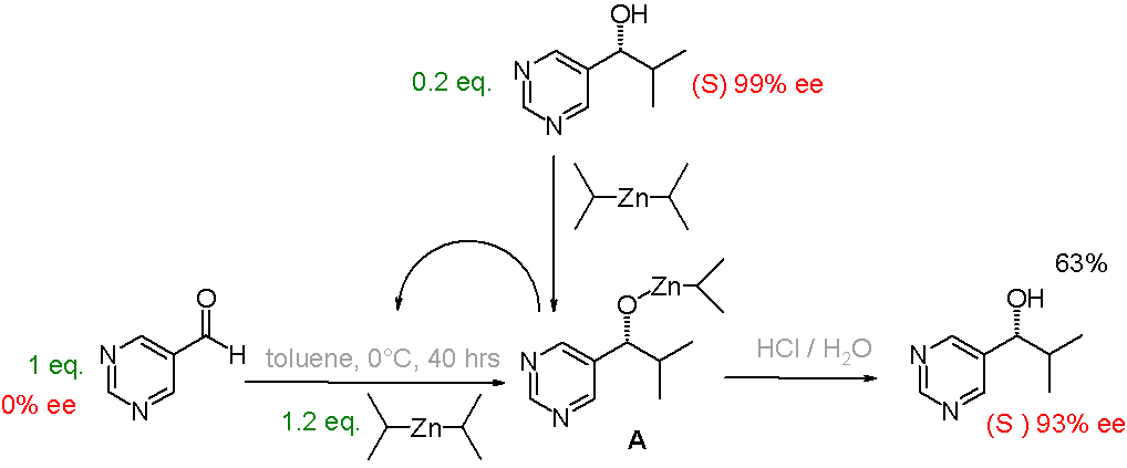 Soai autocatalysis